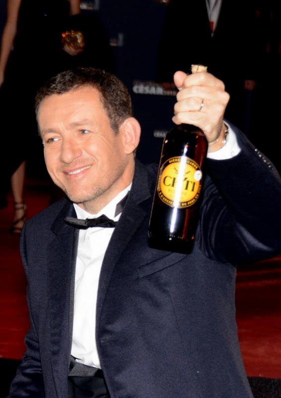 Dany Boon à la cérémonie des César